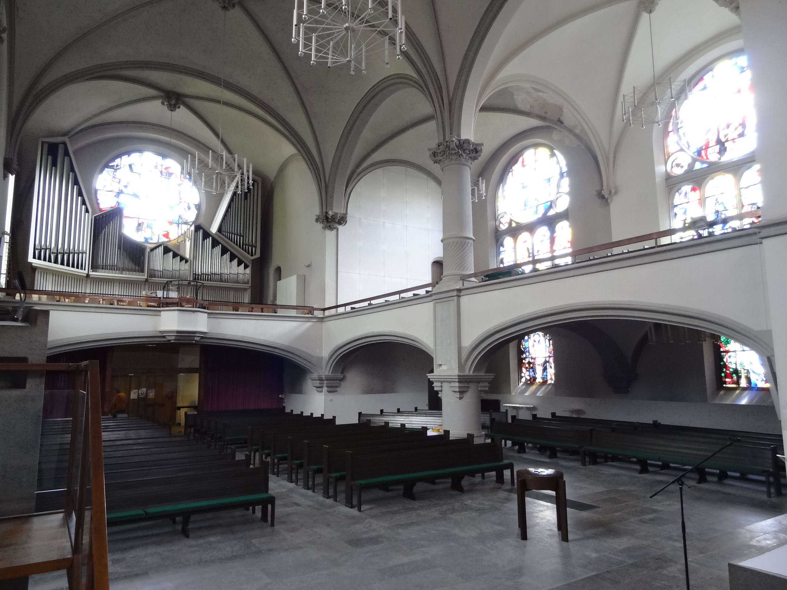 Johanneskirche (Gießen)